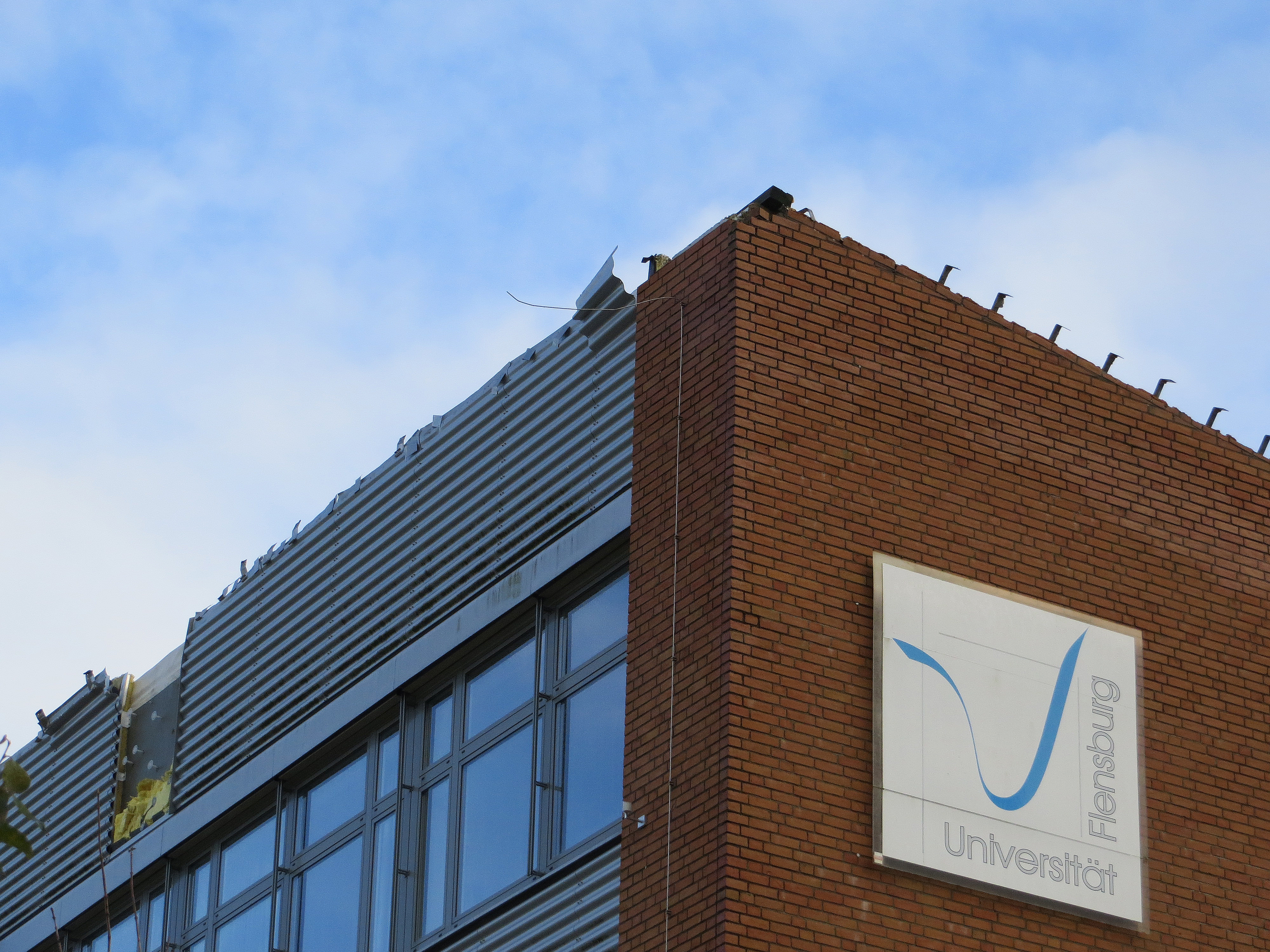 Universität Flensburg, Hauptgebäude von der Seite, stürmischer Herbst 2013; Dachschäden durch den Sturm Christian